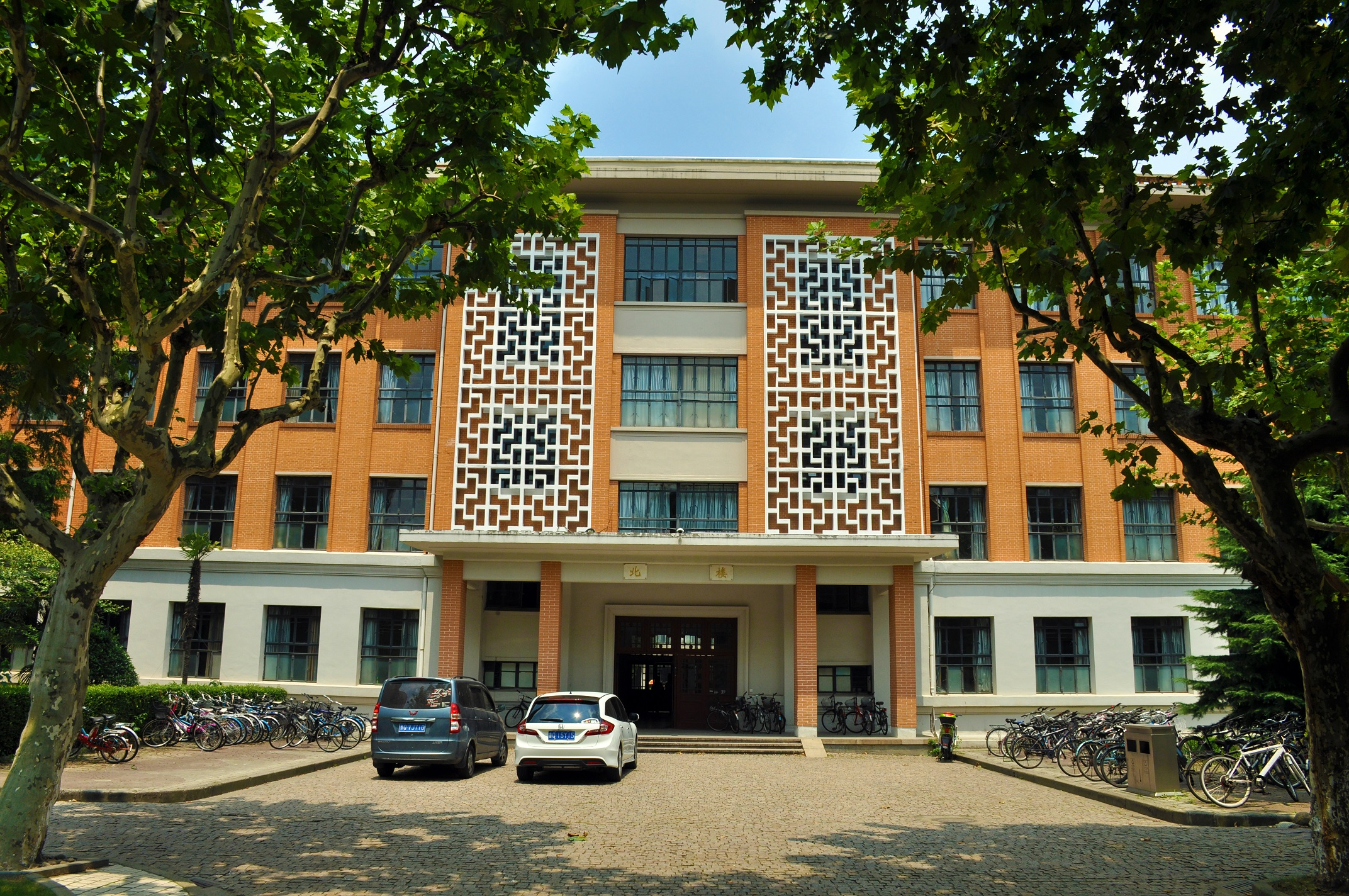 同济大学北楼 四平路1239号同济大学内